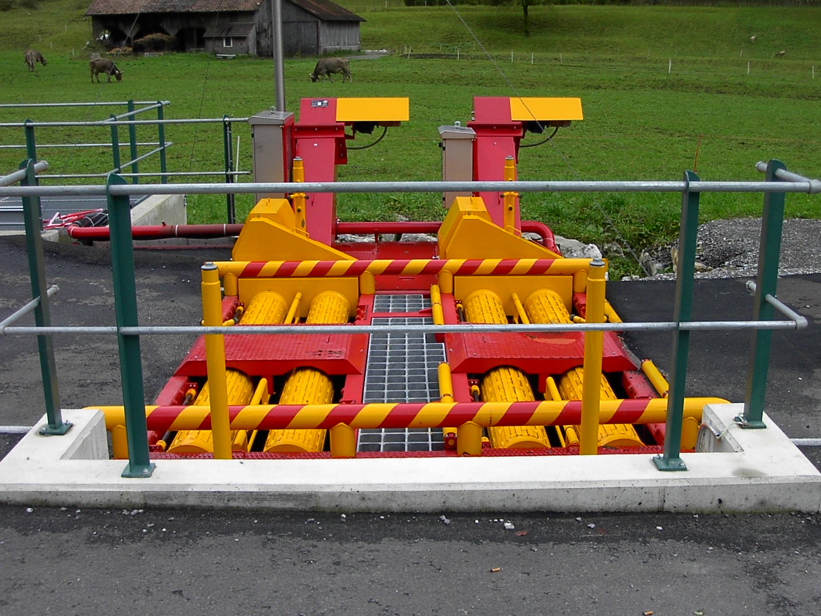 Reifenwaschanlage der FRUTIGER Company AG